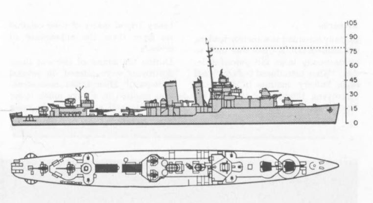 Zeichnung der Farragut-Klasse DD-348 bis DD-355 aus dem Official United States Navy Reference Manual September 1945